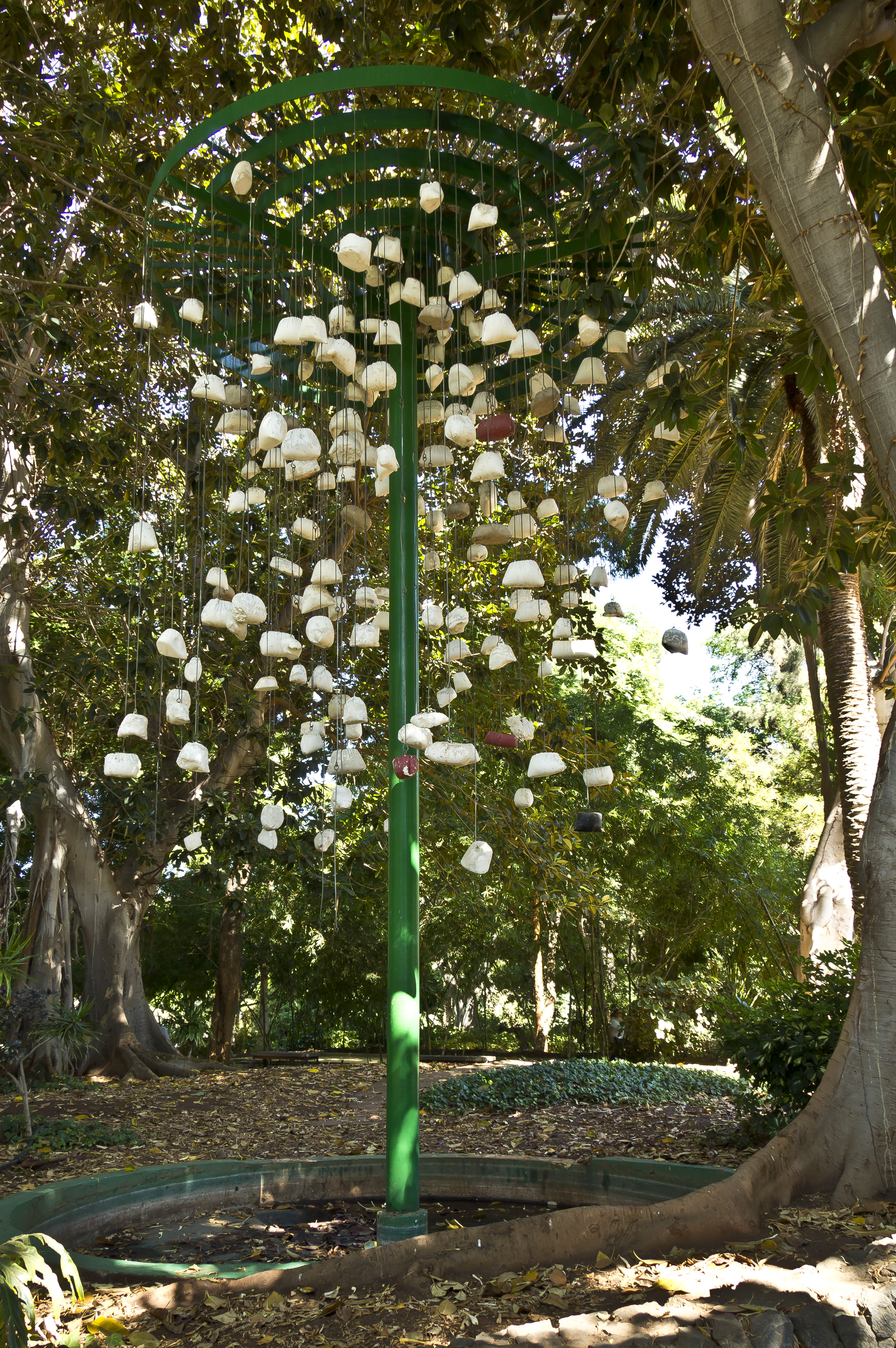 Die Plastik wurde von dem aus Barcelona stammenden Künstler Josep Guinovart im Jahr 1973 geschaffen. Sie wurde Rahmen der „Exposición Internacional de Escultura en la Calle“ der Architektenkammer der Kanarischen Inseln im Parque García Sanabria in Santa Cruz de Tenerife installiert. Die Maße sind 7,2 x 4,0 x 4,0 m.